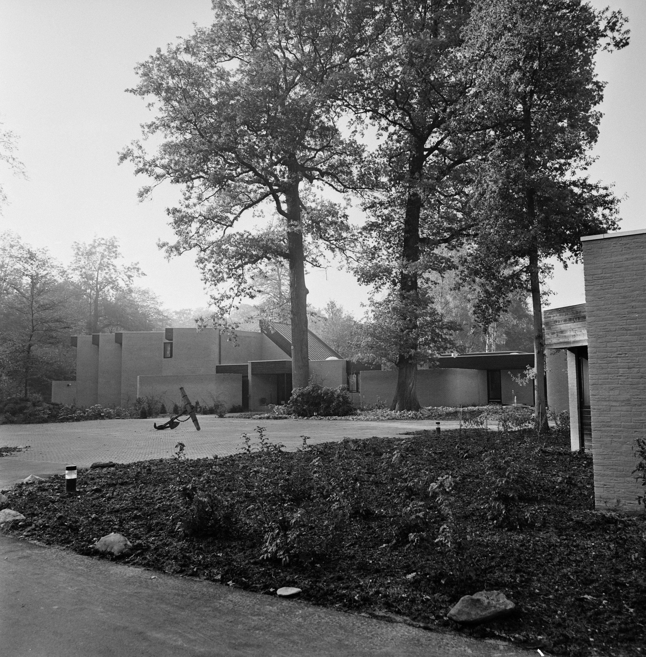 Collectie / Archief : Fotocollectie Anefo Reportage / Serie : [ onbekend ] Beschrijving : Prinses Margriet en mr. Pieter van Vollenhoven in nieuw huis in Apeldoorn; interieurs en exterieurs etc. Datum : 24 oktober 1975 Trefwoorden : exterieur, huizen Persoonsnaam : Margriet, prinses, Vollenhoven, Pieter van Fotograaf : Mieremet, Rob / Anefo Auteursrechthebbende : Nationaal Archief Materiaalsoort : Negatief (zwart/wit) Nummer archiefinventaris : bekijk toegang 2.24.01.03 Bestanddeelnummer : 928-2287